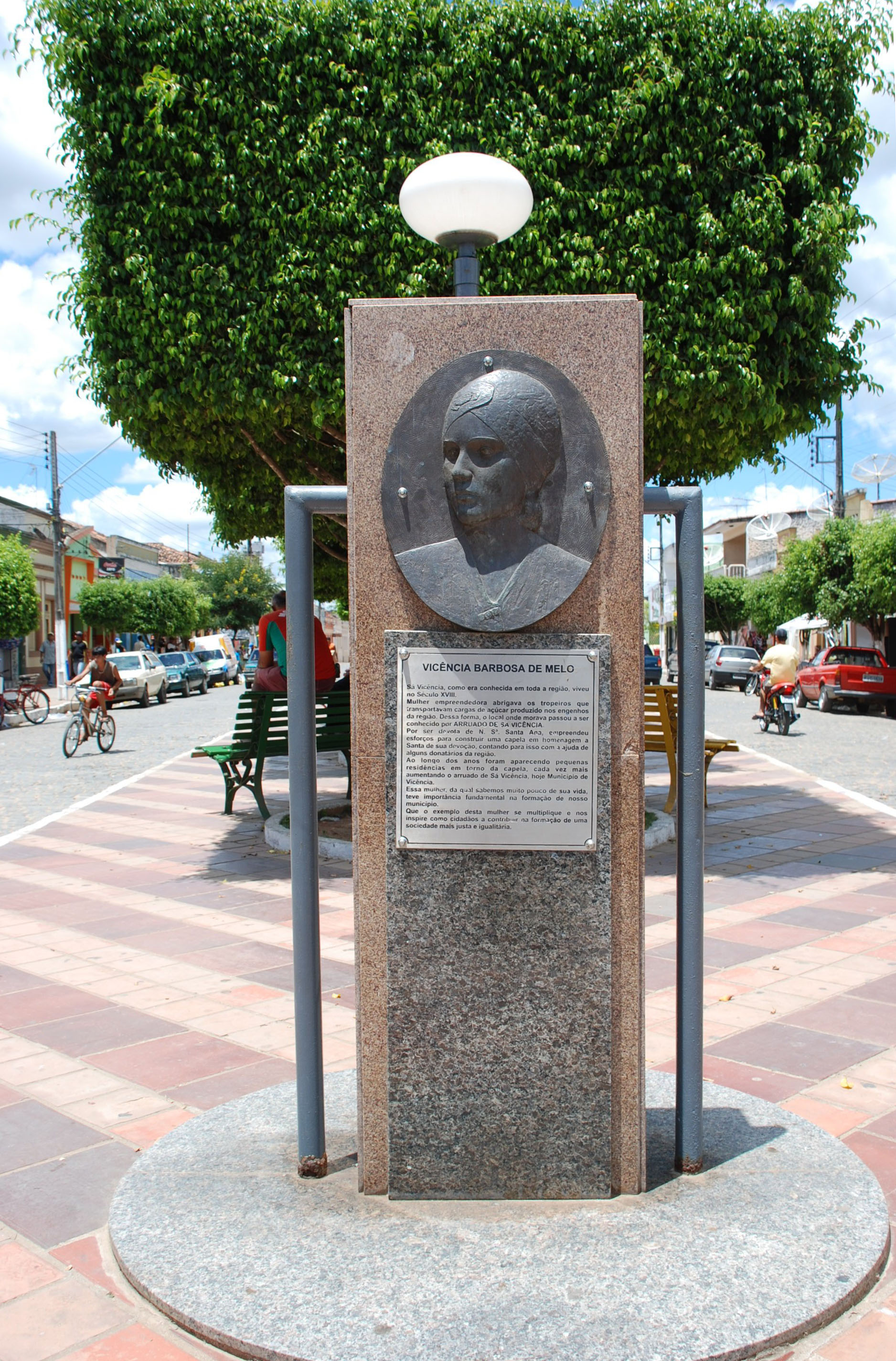 Busto de Vicência Barbosa de Melo, na Praça Urbano Ramos, Vicência, Pernambuco, Brasil